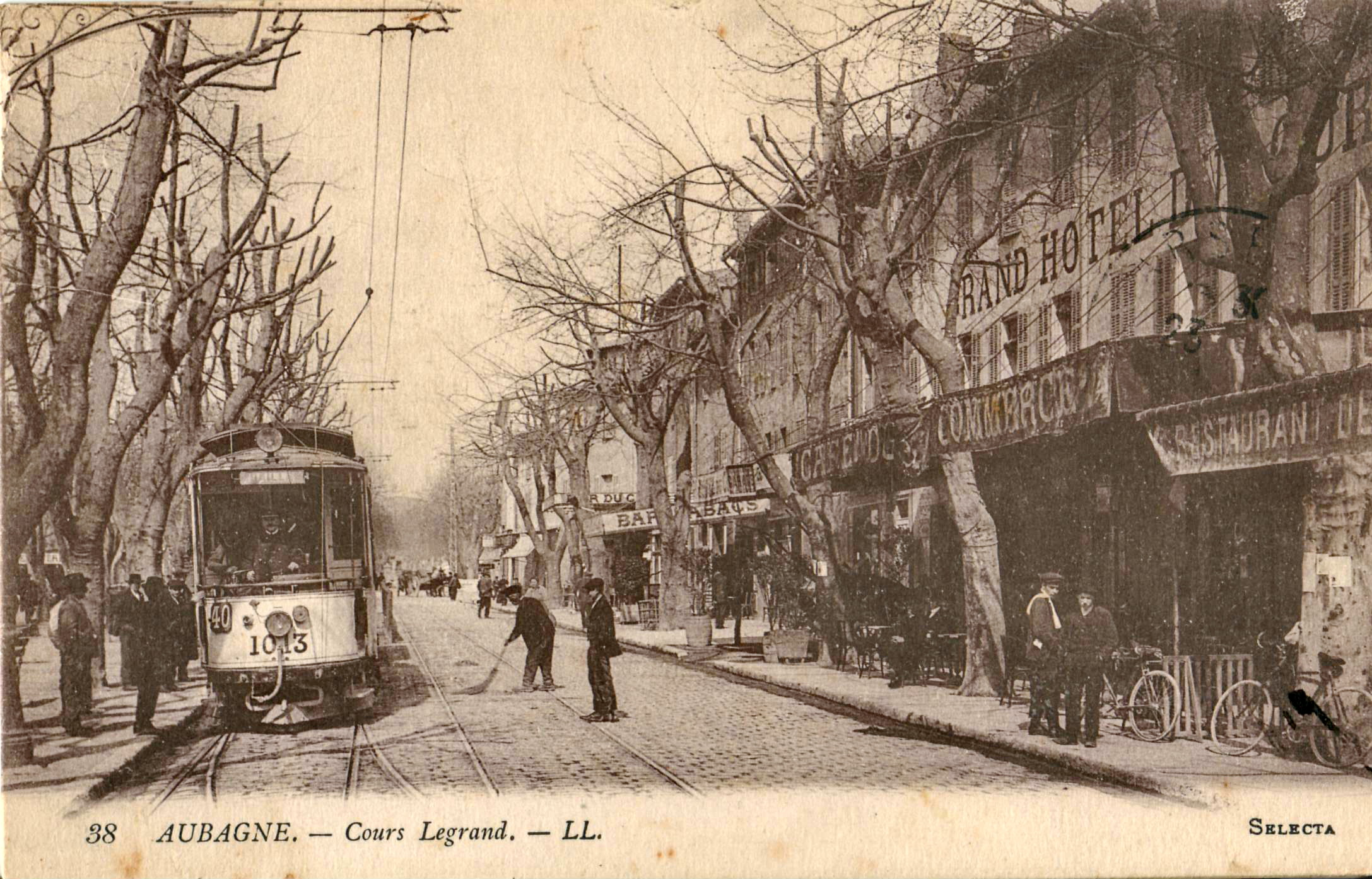 Carte postale ancienne éditée pour Selecta par LL, n°38 :AUBAGNE - Cours Legrand